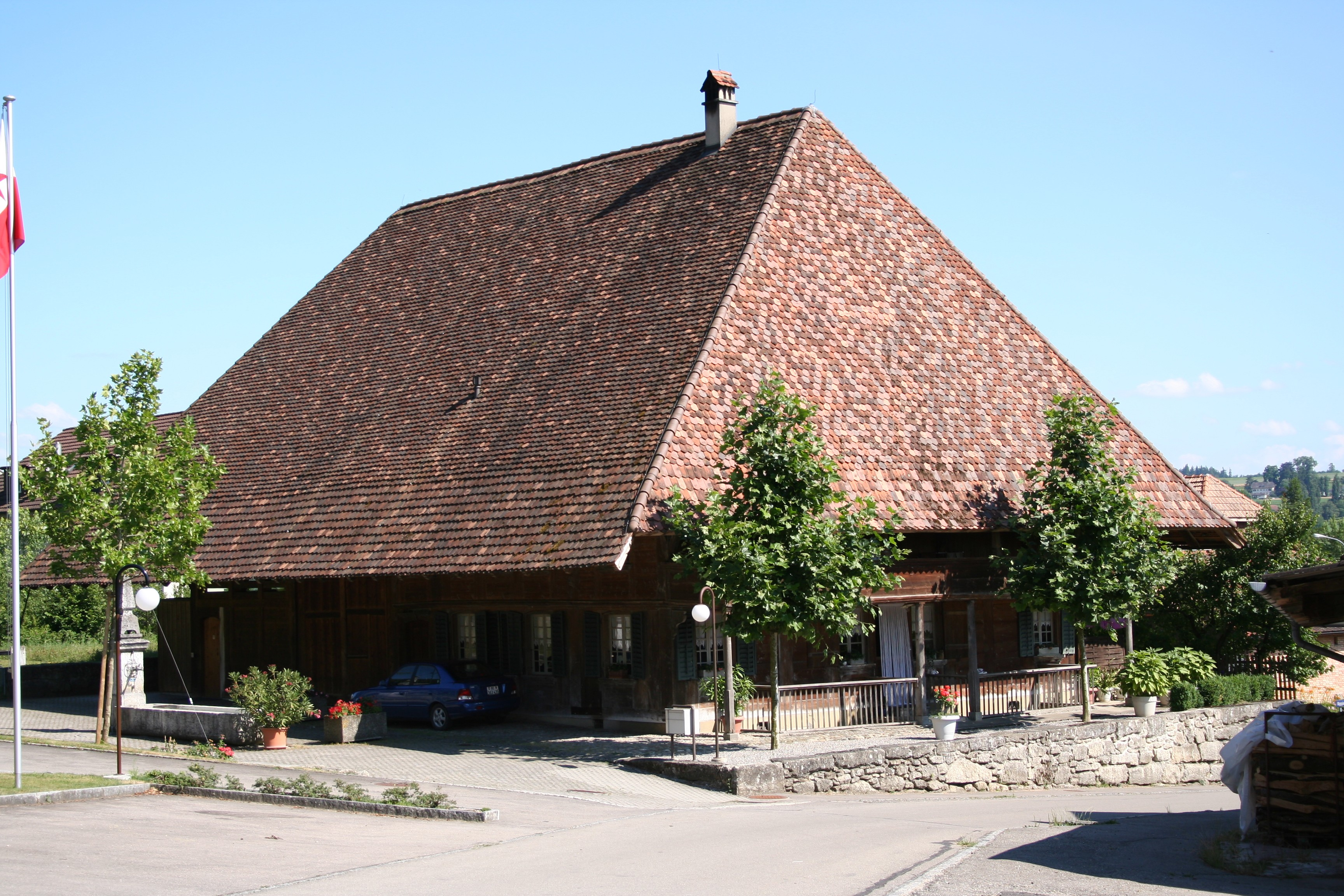 Bauernhaus in Dotzigen, Schweiz